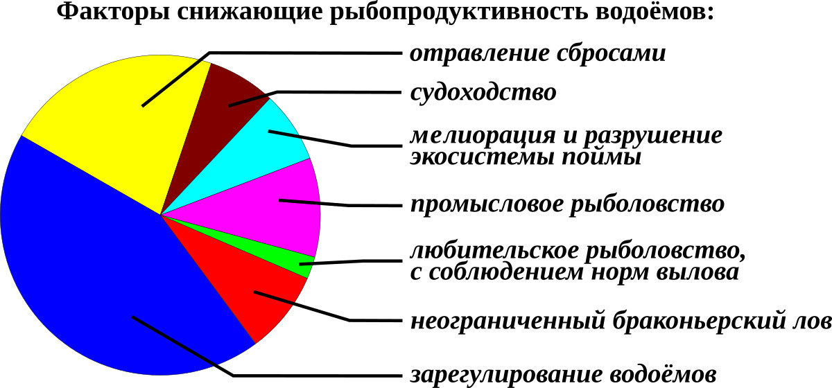 Роль любительского рыболовства среди причин сокращения популяций рыб. Подобные диаграммы неоднократно были представлены в научных докладах и трудах институтов рыбного хозяйства и океанографии: АзНИИРХ, ИГБ НАНУ, ЮгНИРО, ВНИРО и т.д. Ещё хотелось бы отметить, что приведённая диаграмма говорит об "усреднённом" водоёме на постсоветском пространстве, естественно в конкретных водоёмах могут превалировать те или иные факторы т.е. если какой-то водоём вытравили стоками то понятно, что на это и прийдутся все 100%.